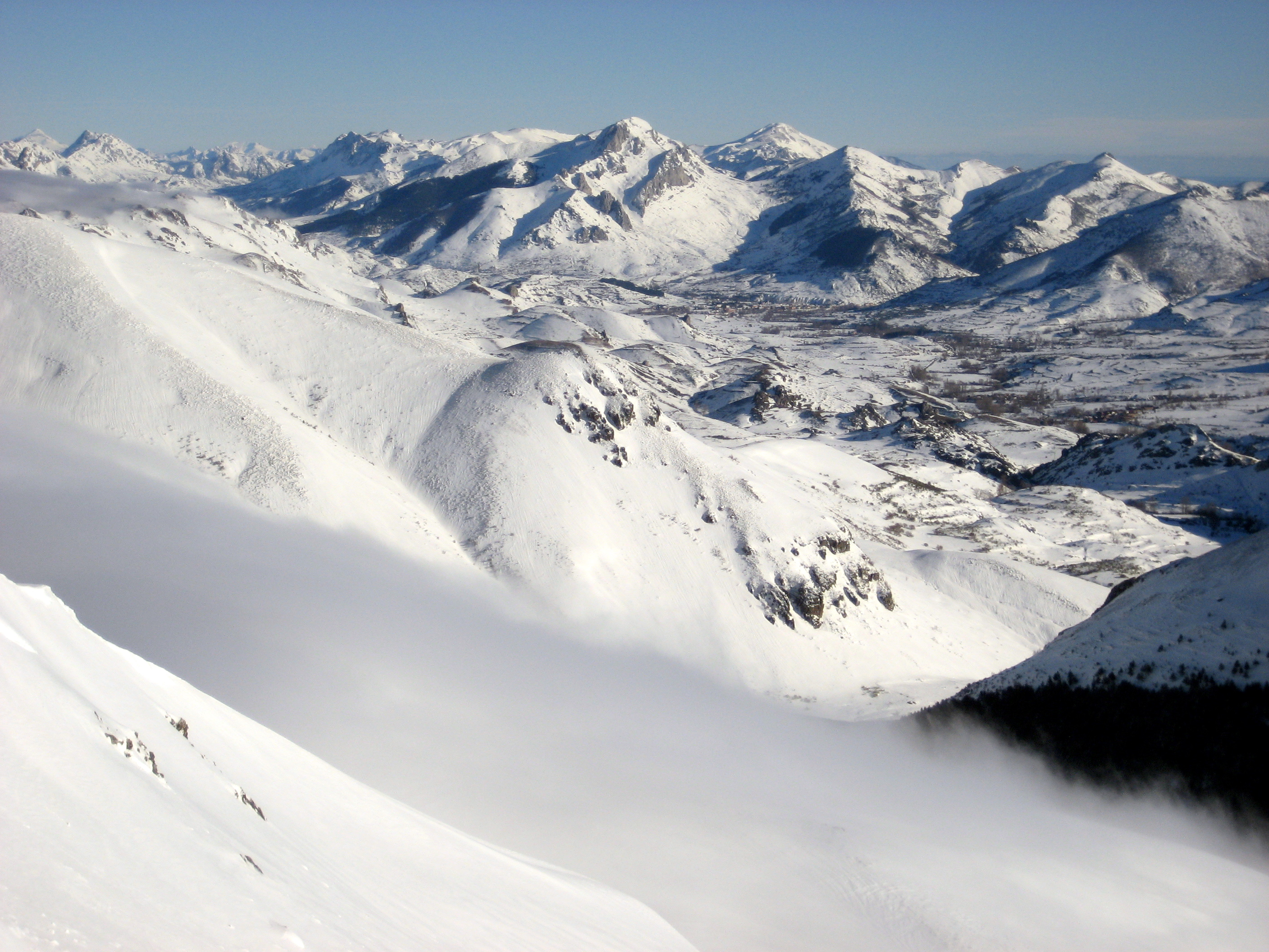 Imagen de Villamanín-León, a finales del otoño de 2008